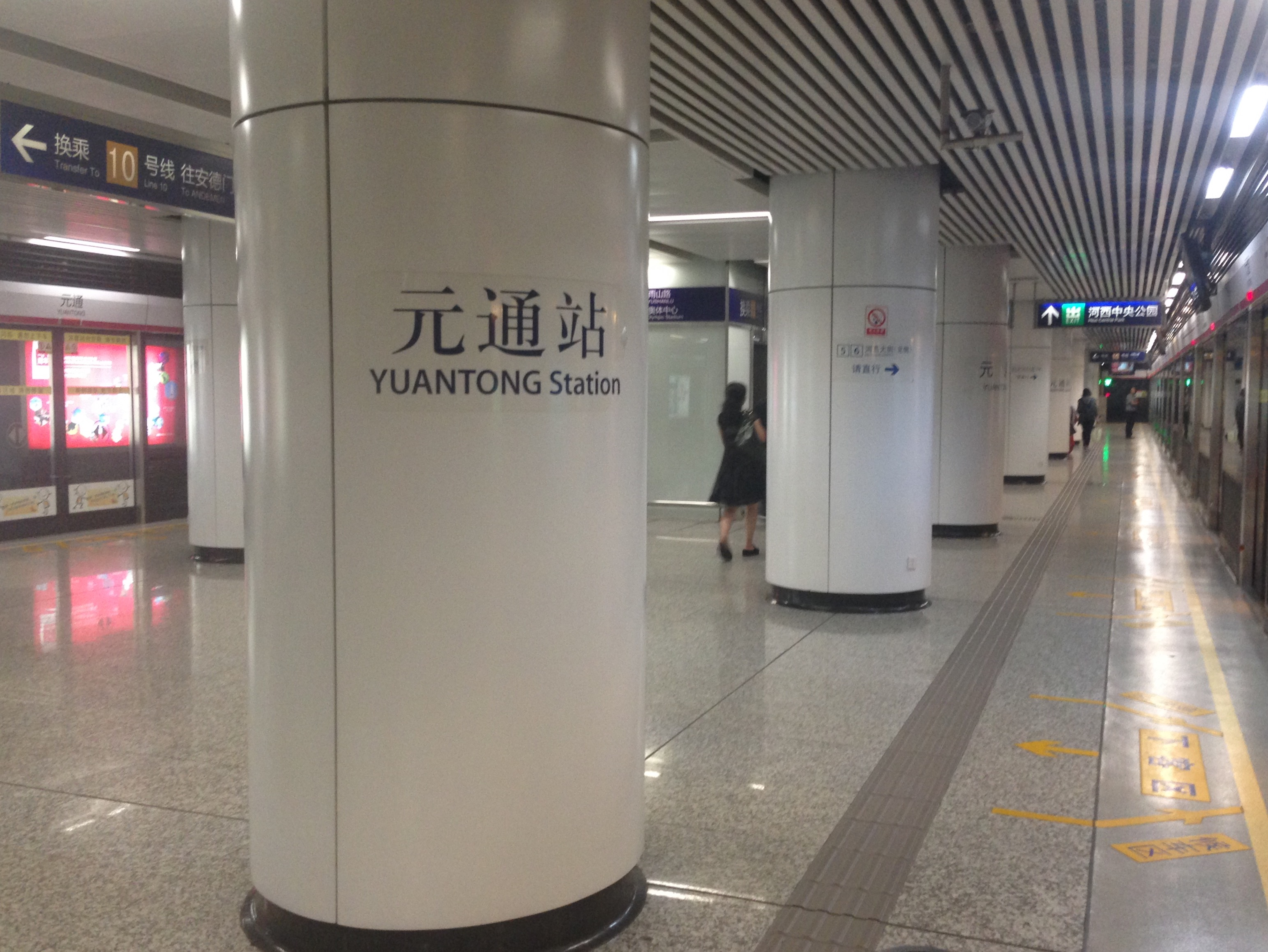 中文（中国大陆）: 南京地铁2号线元通站站台